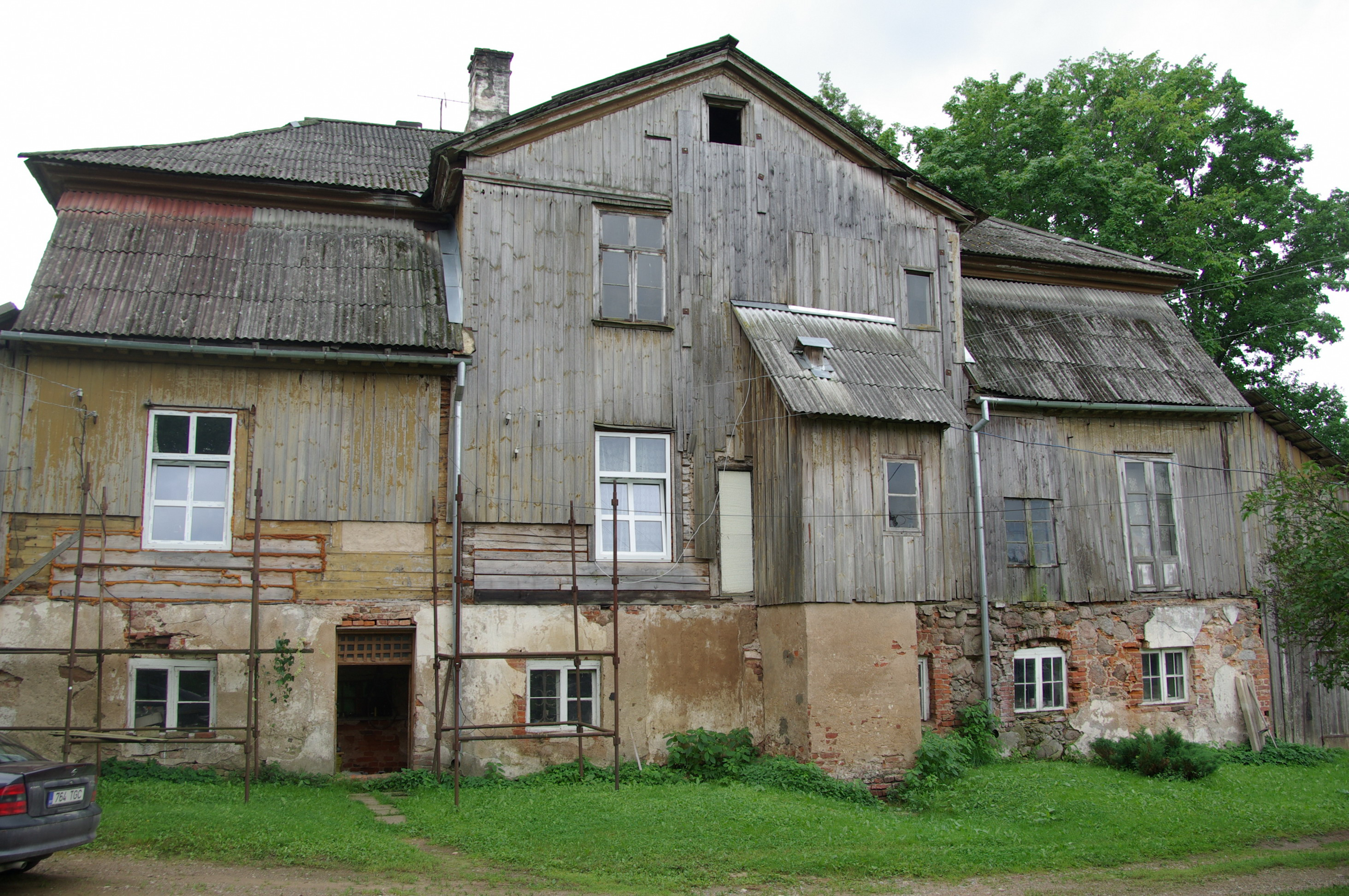 Põlva maakond, Räpina vald, Toolamaa küla